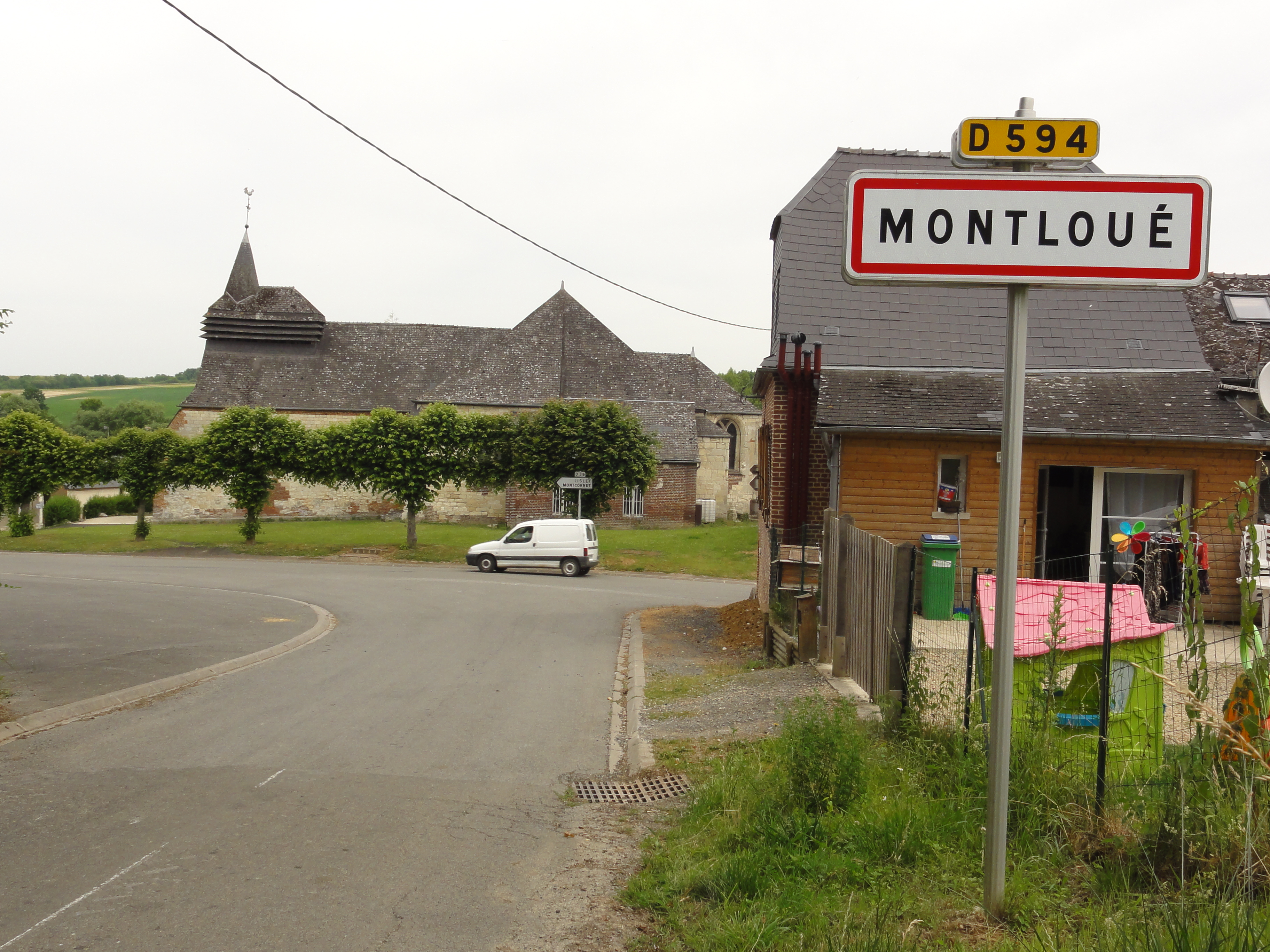 Montloué (Aisne) city limit sign